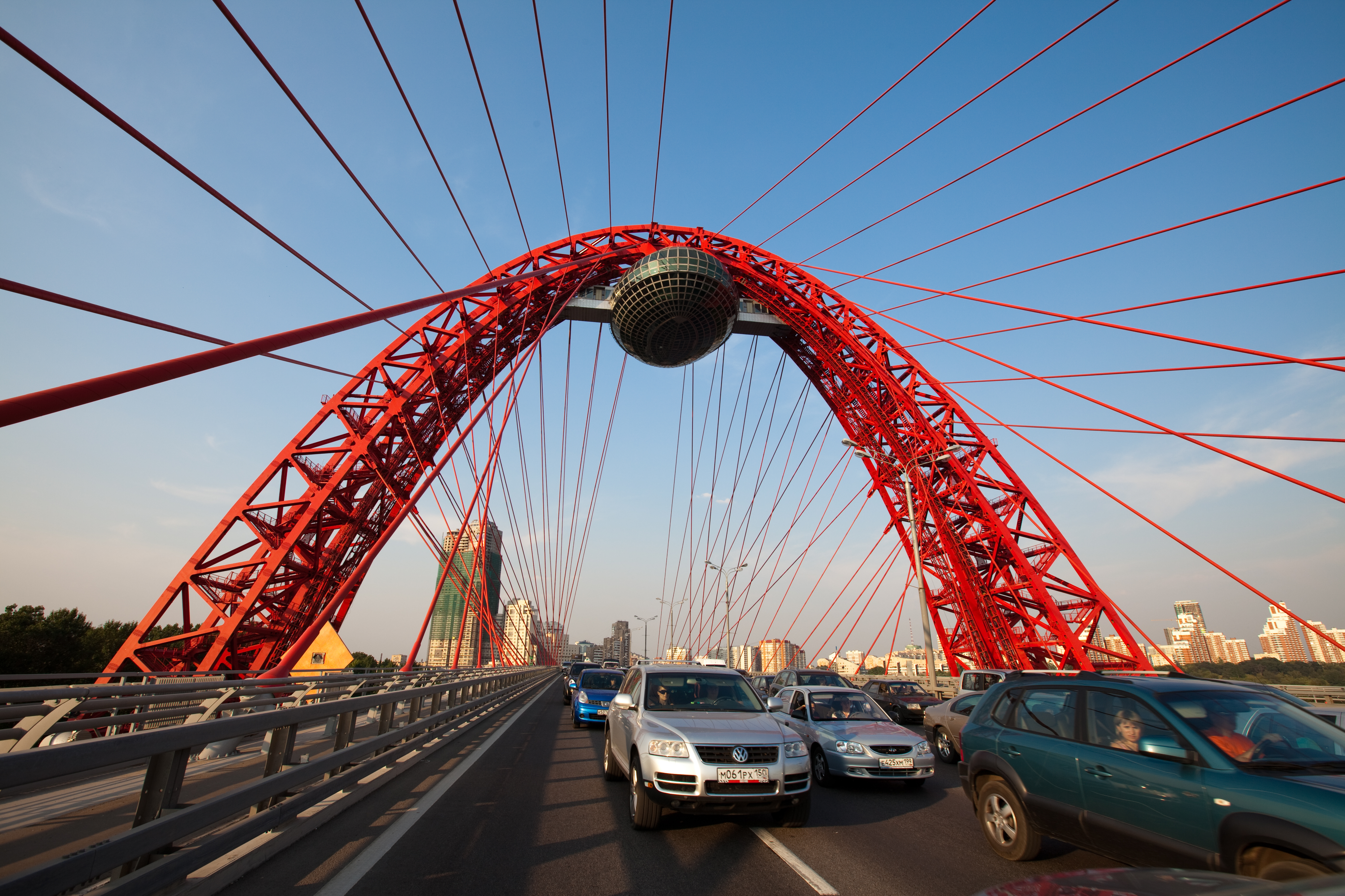 Фото 2010 года